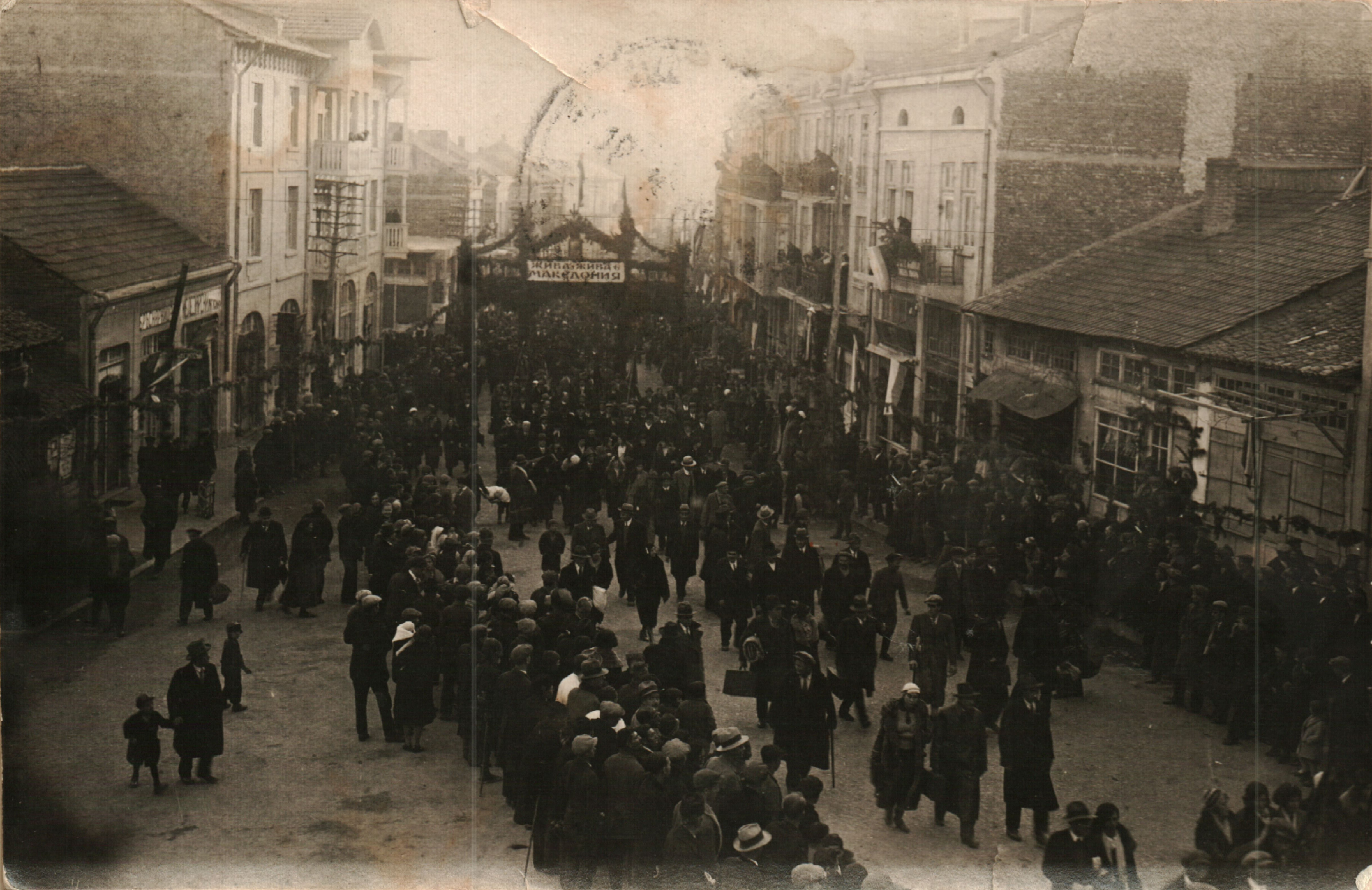 Снимка на участници в XI редовен Македонски конгрес. Горна Джумая, 12 февруари 1933 г.